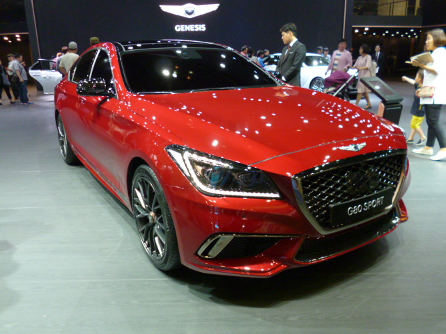 ジェネシス・G80